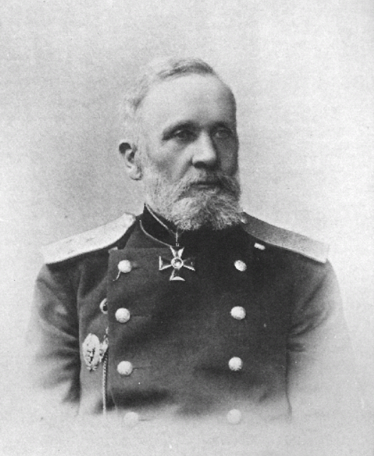 Генерал ад інфантэрыі be:Павел Восіпавіч Баброўскі